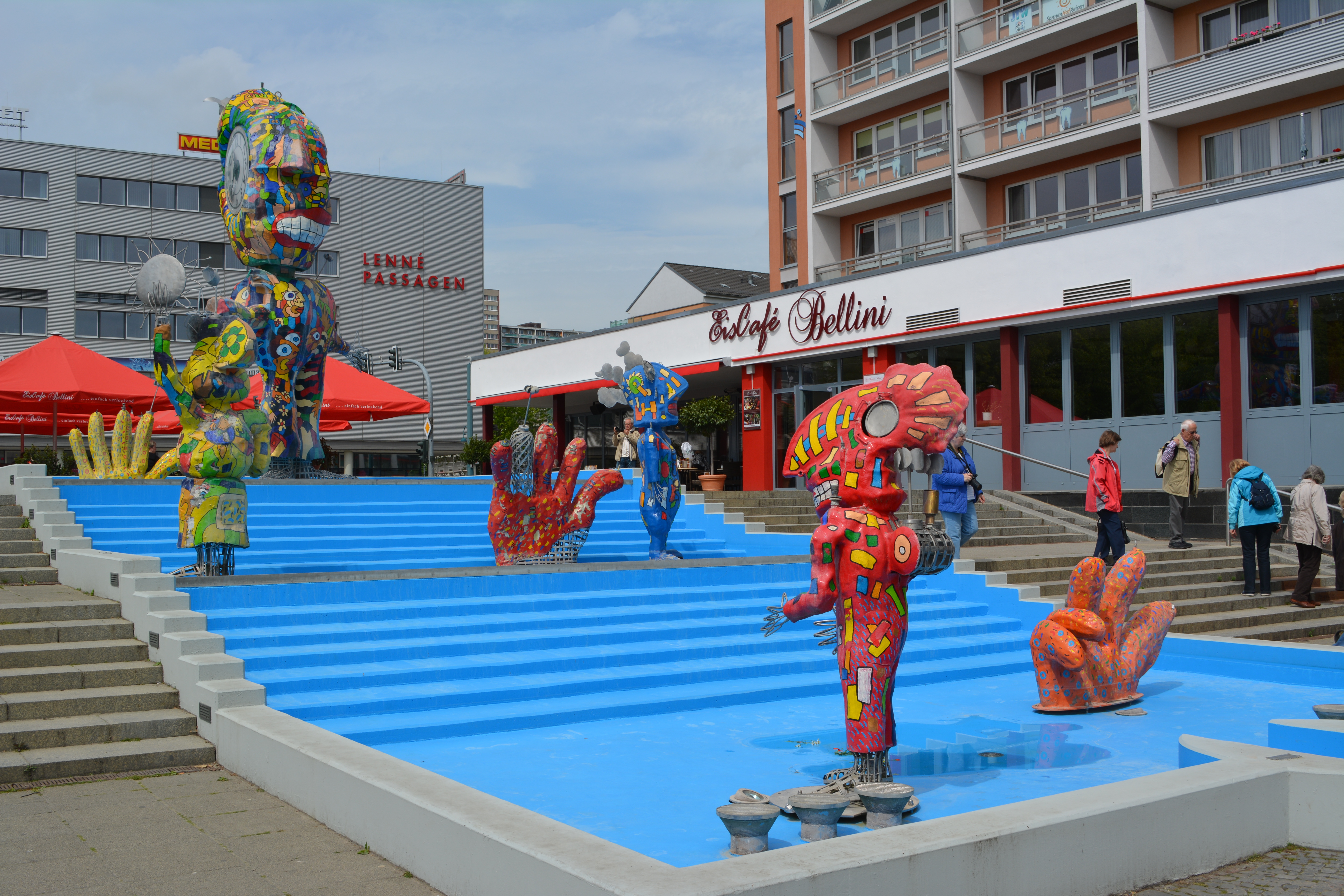 Brunnenplatz mit Blick auf die Lenné-Passagen im Zentrum von Frankfurt (Oder)